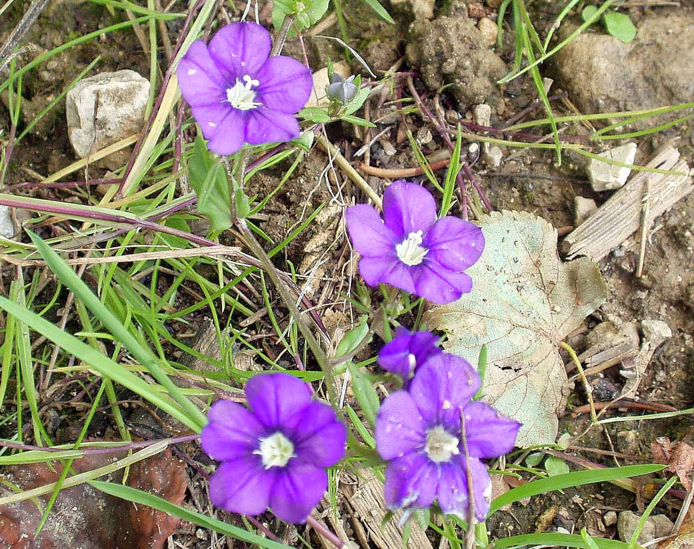 Legousia speculum-veneris Unterfranken